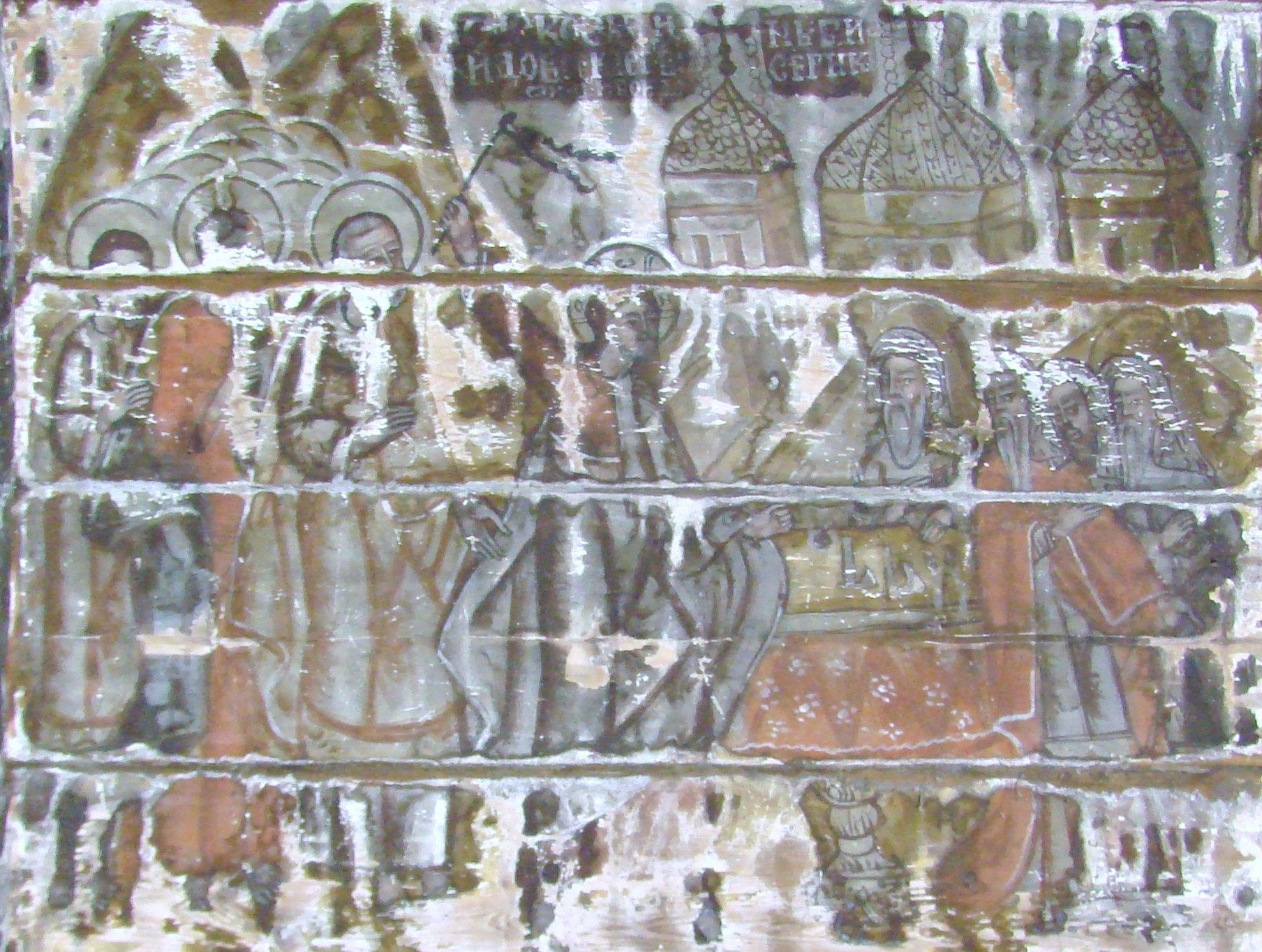 Biserica de lemn „Sfinții Arhangheli Mihail și Gavriil” din Sângătin, comuna Apoldu de Jos, județul Sibiu